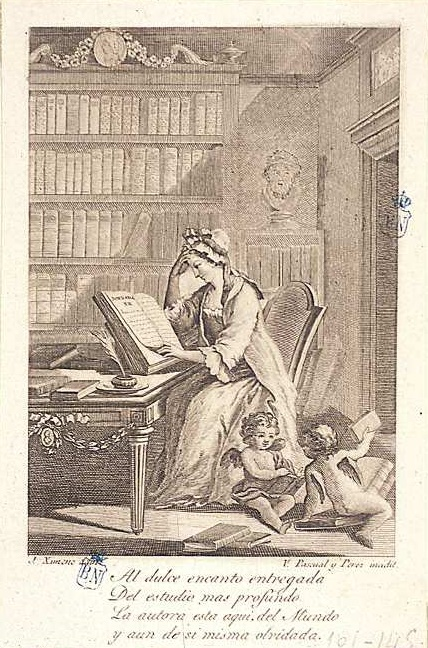 Madame de Gómez leyendo en su estudio. Aguafuerte de Vicente Pascual y Pérez por dibujo de José Antonio Ximeno y Carrera. Biblioteca Nacional de España. Ilustración de "Jornadas divertidas, políticas sentencias y hechos memorables de reyes y héroes de la antigüedad" escritas por... Madama de Gómez... Madrid: Imprenta de Villalpando, 1797 Inscripción a pie: "Al dulce encanto entregada / Del estudio mas profundo / La autora esta aqui, del Mundo / y aun de si misma olvidada."